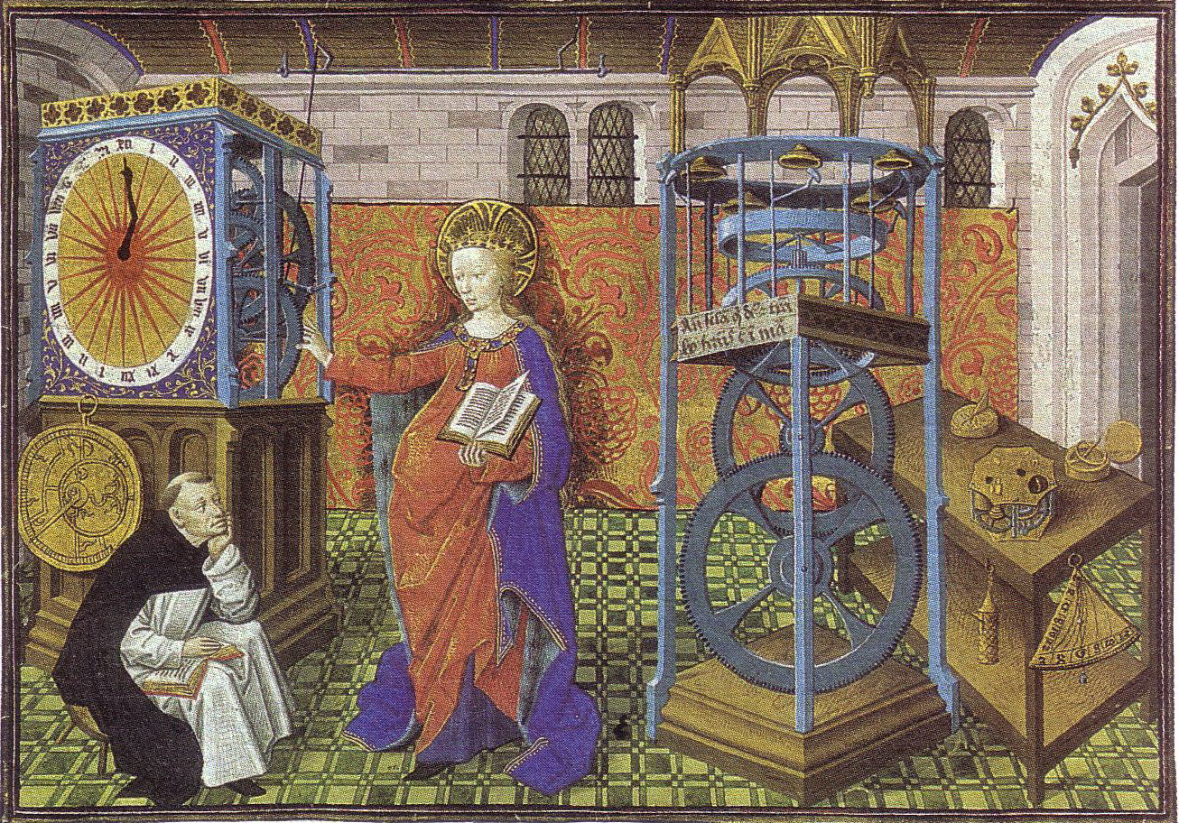 Instruments de mesure du temps du XVe siècle